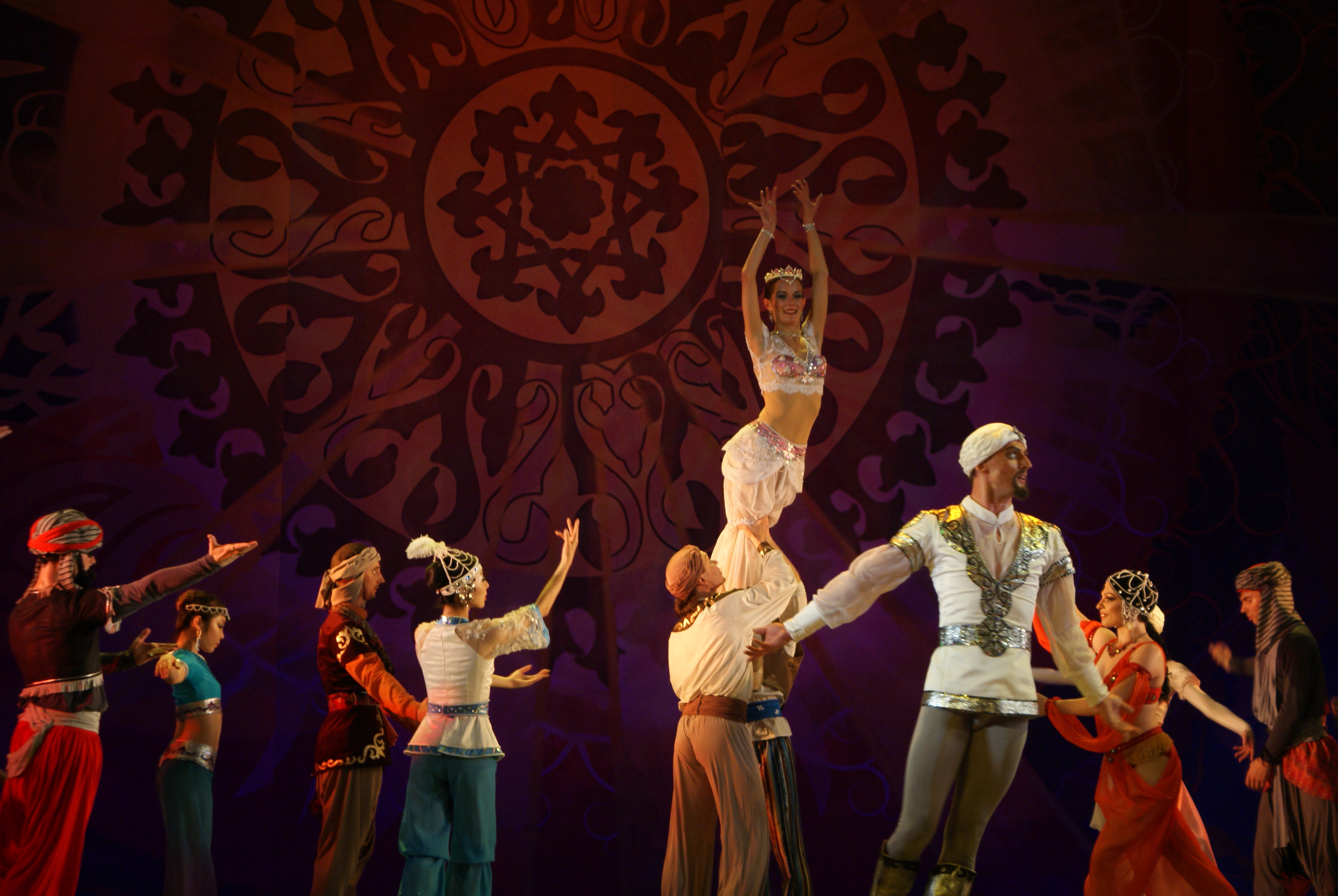 Тысяча і адна ноч у Беларускім дзяржаўным акадэмічным музычным тэатры